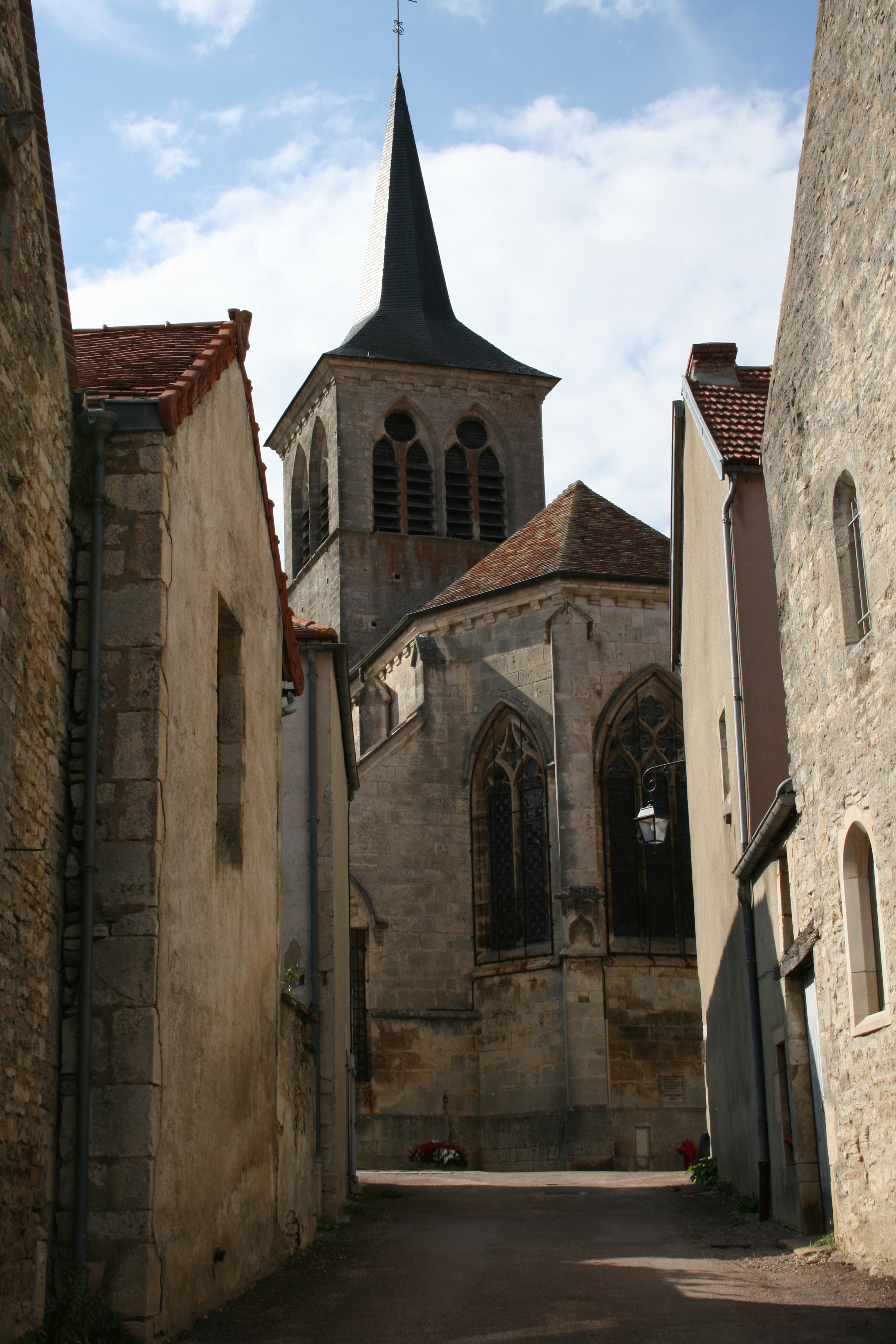 Flavigny-sur-Ozerain Eglise Saint Genest vue de l'abside